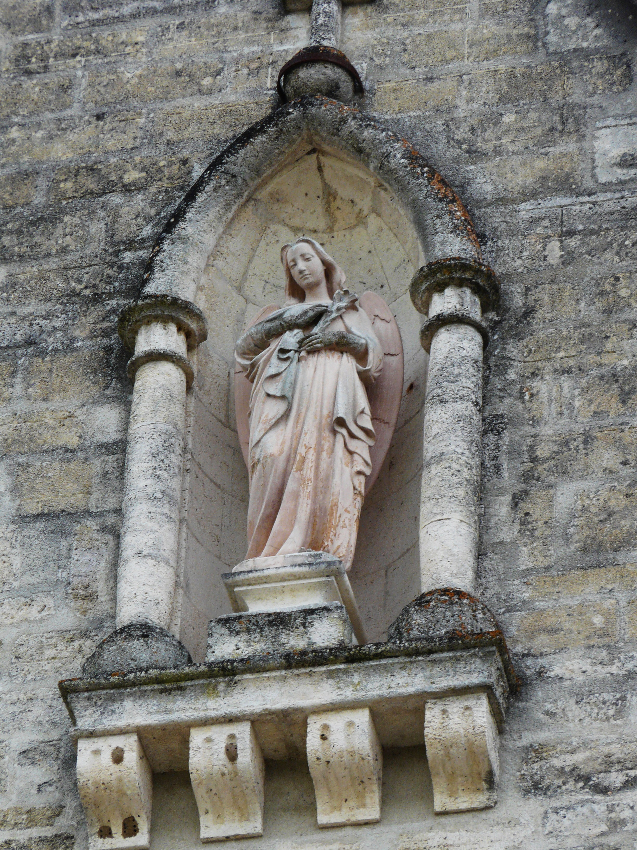 Statue représentant un ange, Chartreuse de Vauclaire, Montpon-Ménestérol, Dordogne, France